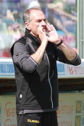 Francesco Guidolin (Castelfranco Veneto, 3 ottobre 1955) è un allenatore di calcio ed ex calciatore italiano, di ruolo centrocampista centrale o di fascia, attuale tecnico dell'Udinese.